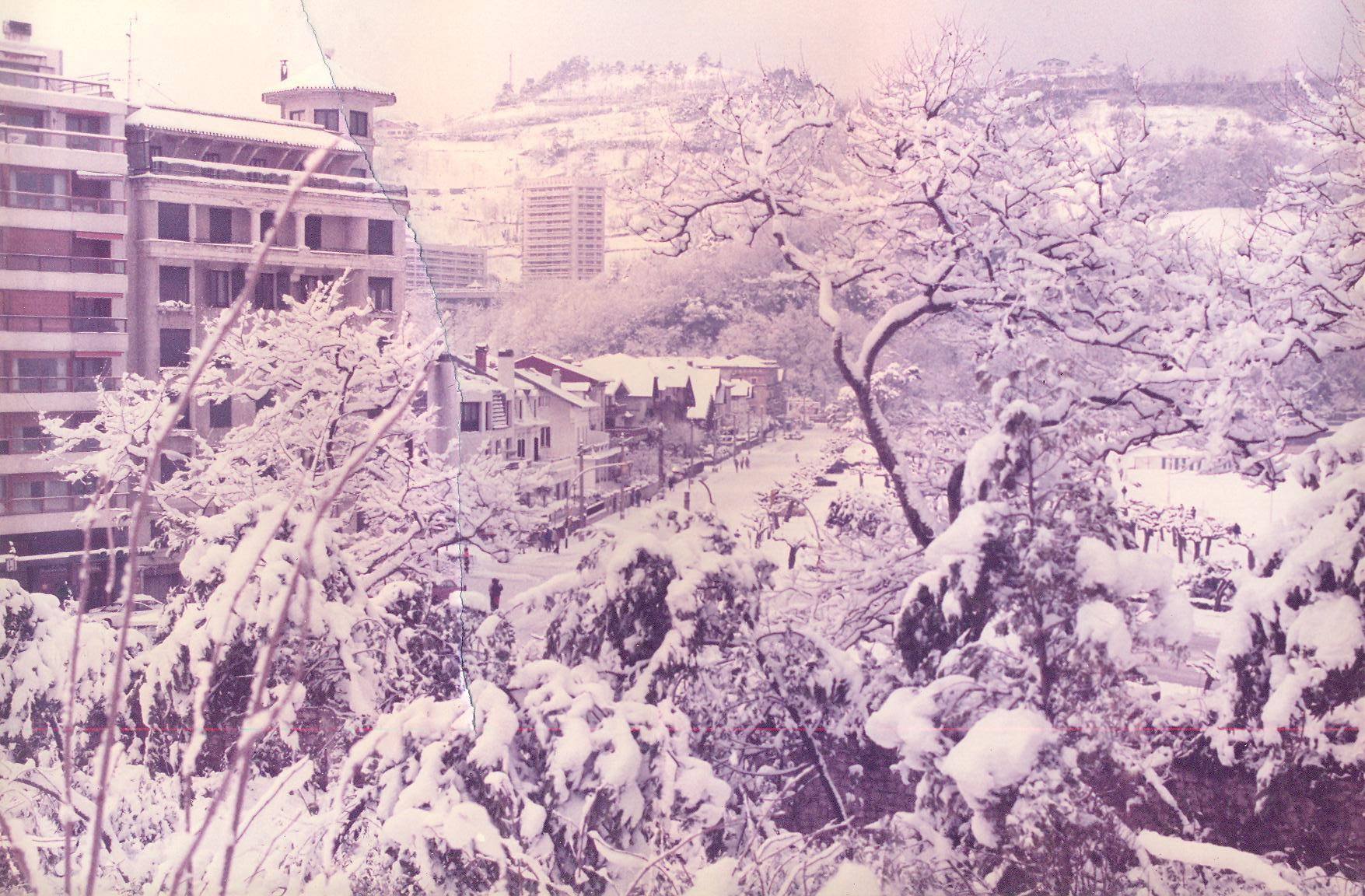 1:Ondarretako lorategiak eta Miramar elurpean 1985eko urtarrileko hotzaldian.